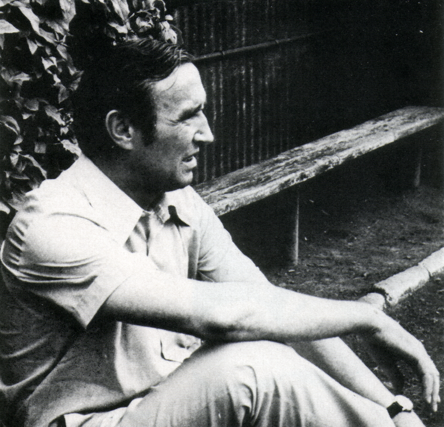 Српски (ћирилица): Сретен Беговац на тренерској клупи